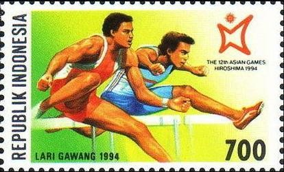 1994 Asian Games